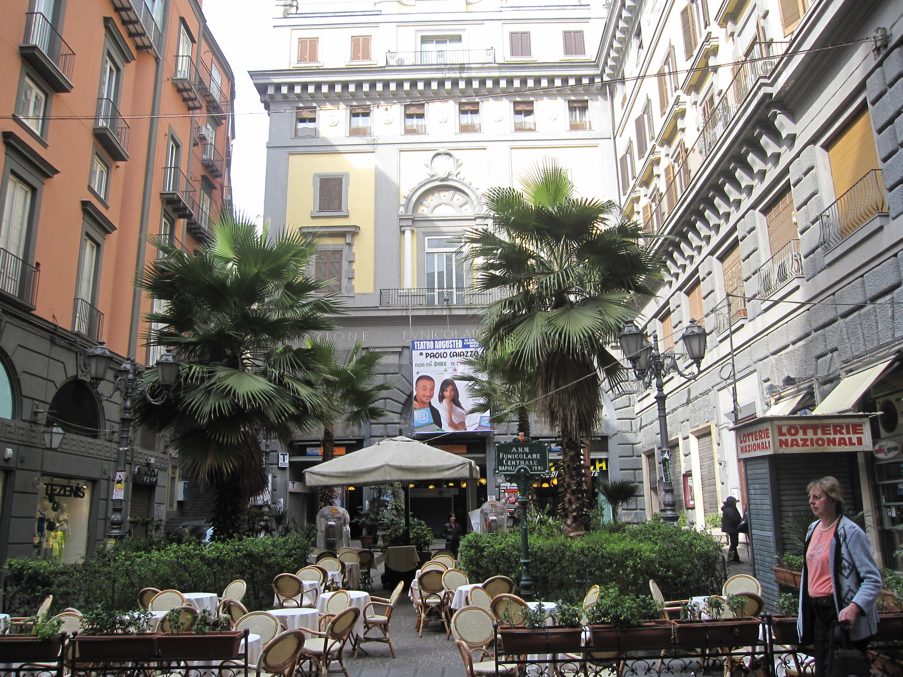 Piazzetta Duca d'Aosta o Largo Augusteo (Napoli). Frontalmente è visibile la Stazione della Funicolare Centrale ed il Teatro Augusteo, il cui accesso è sul lato destro della piazza.